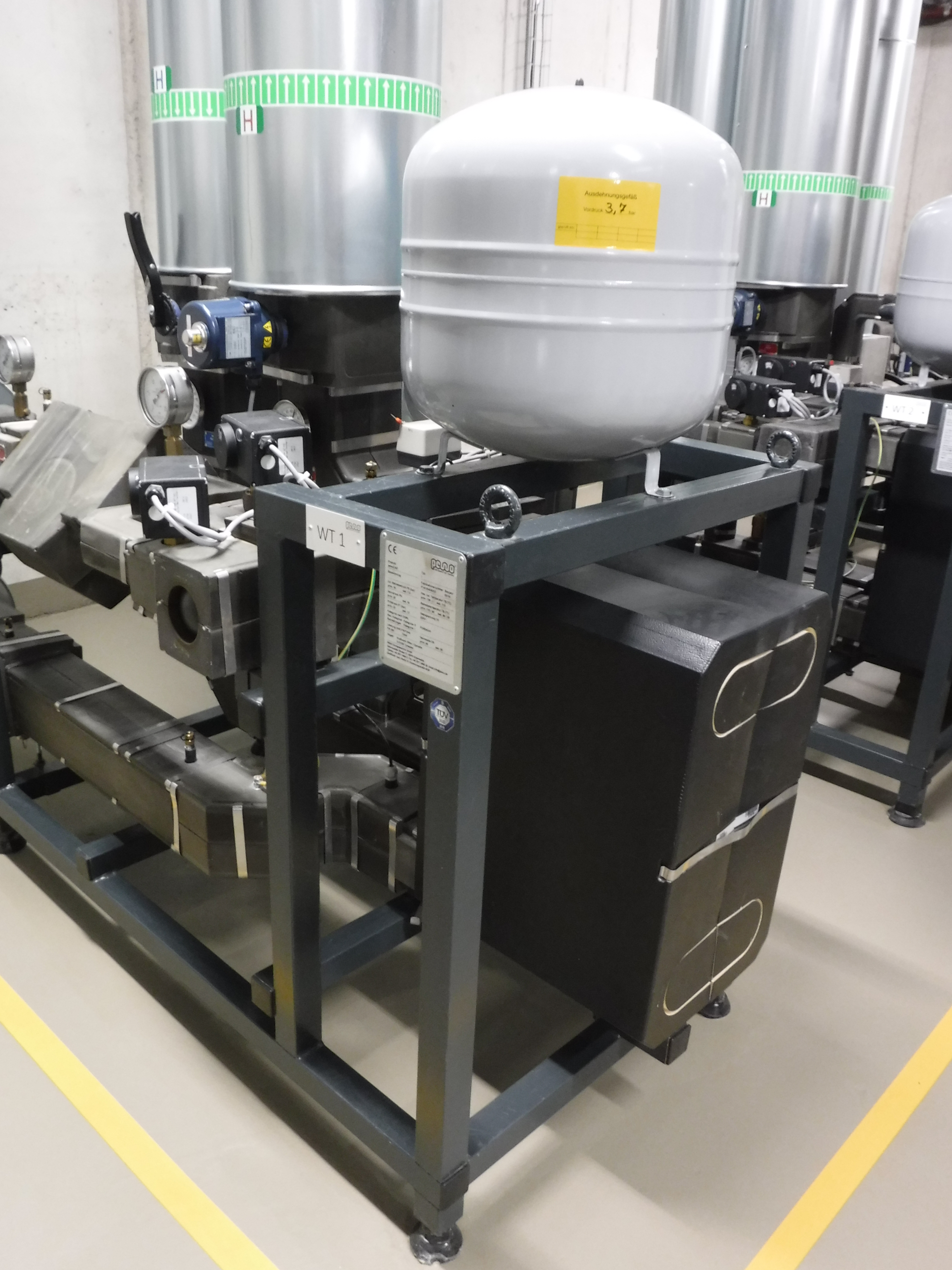 Plattenwärmeübertrager pewoCAD in der Heizzentrale im Kulturkraftwerk Dresden